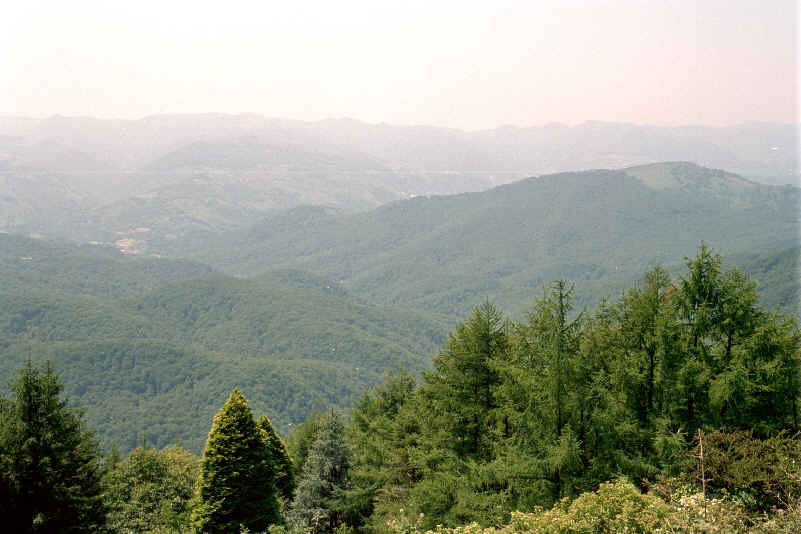 Señorío de Bértiz en la provincia de Navarra, (España). Vista hacia el Sur desde el Castillo de Aizcolegui. El valle que se distingue a medio fondo, tras los espesos bosques, es el del río Bidasoa, con la localidad de Oronoz-Mugaire a la izquierda. Tomada por JMSE el 8 de julio de 2003 y cedida a Wikipedia. Categoría:España (imagen) Categoría:Fotografía (imagen)